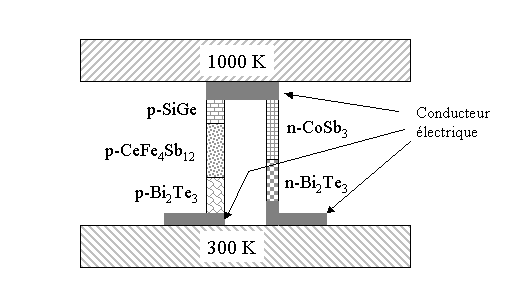 Module thermoélectrique constitué de plusieurs matériaux dans chacune des branches. schéma réalisée par Utilisateur:David Berardan) Utilisateur:David Berardan